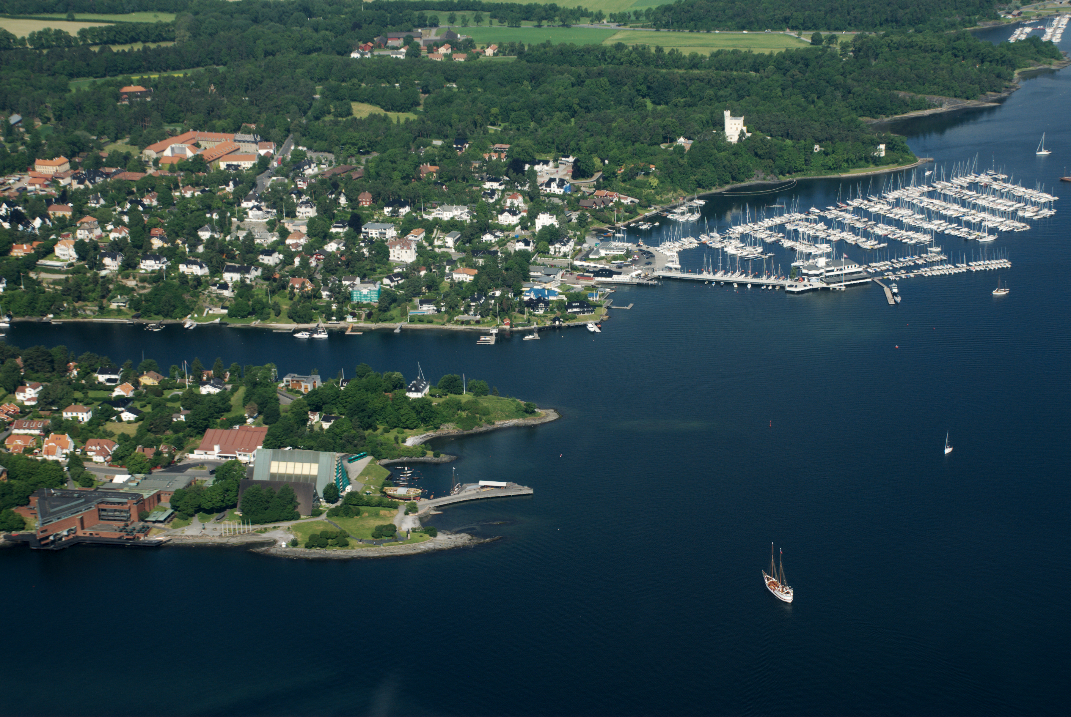 Bygdøy